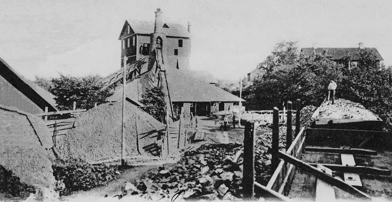 Högfors bruks masugn 1902